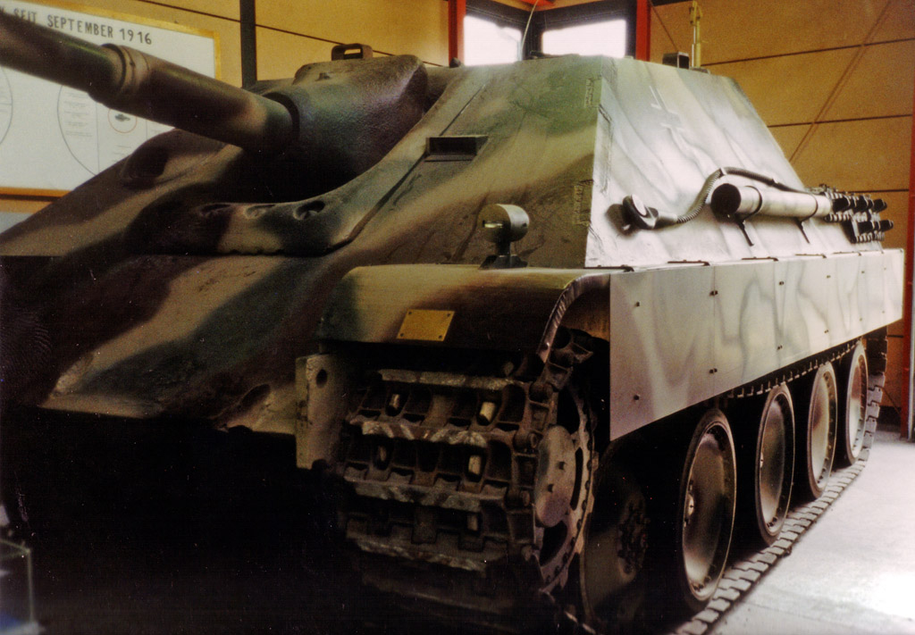 Beschreibung: Jagdpanzer V Jagdpanther (Sd.Kfz. 173), ausgestellt im Panzermuseum Munster